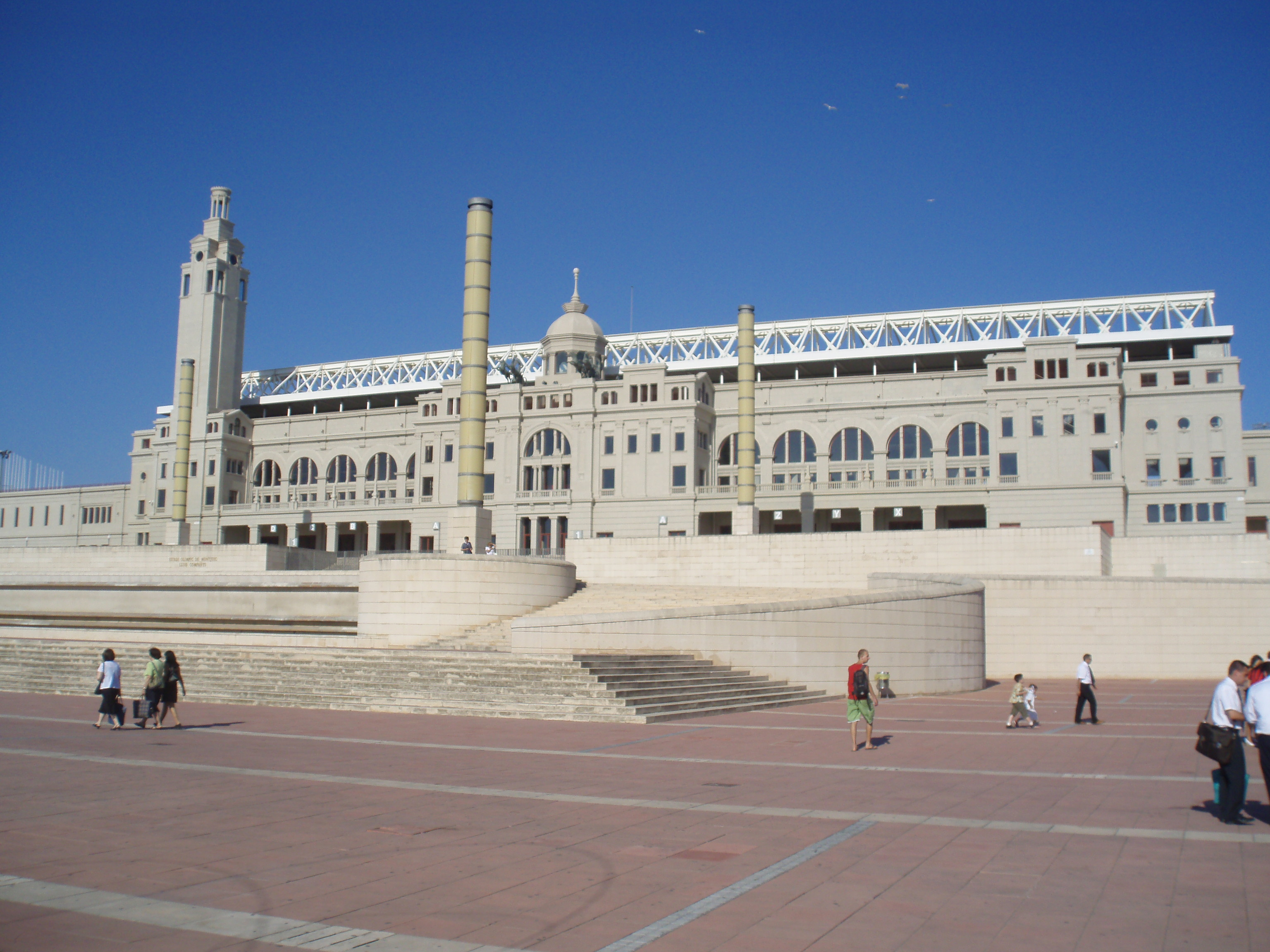 Description= Estadi Olímpic Lluís Companys, Barcelona, Spain